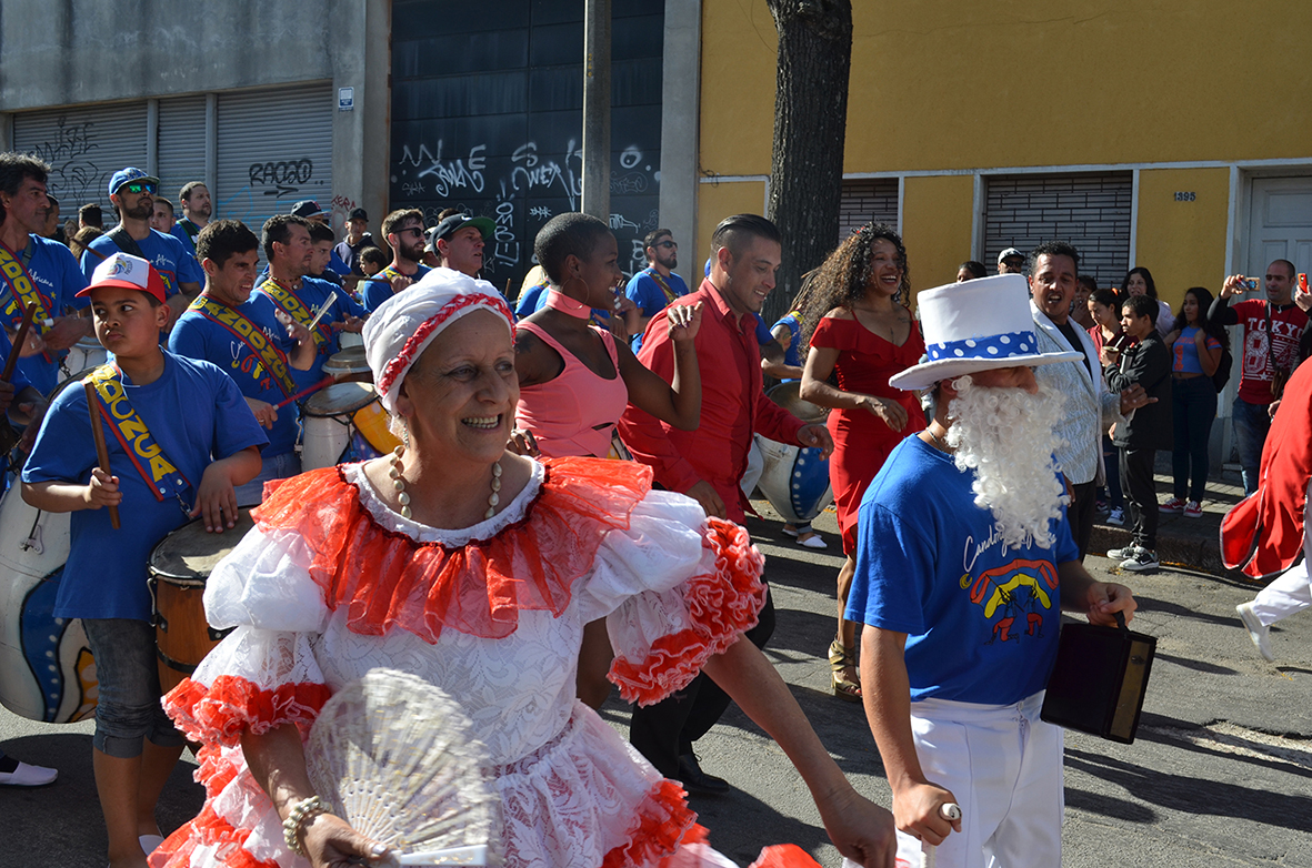 Les personnages traditionnels du candombe (Montevideo 2018)